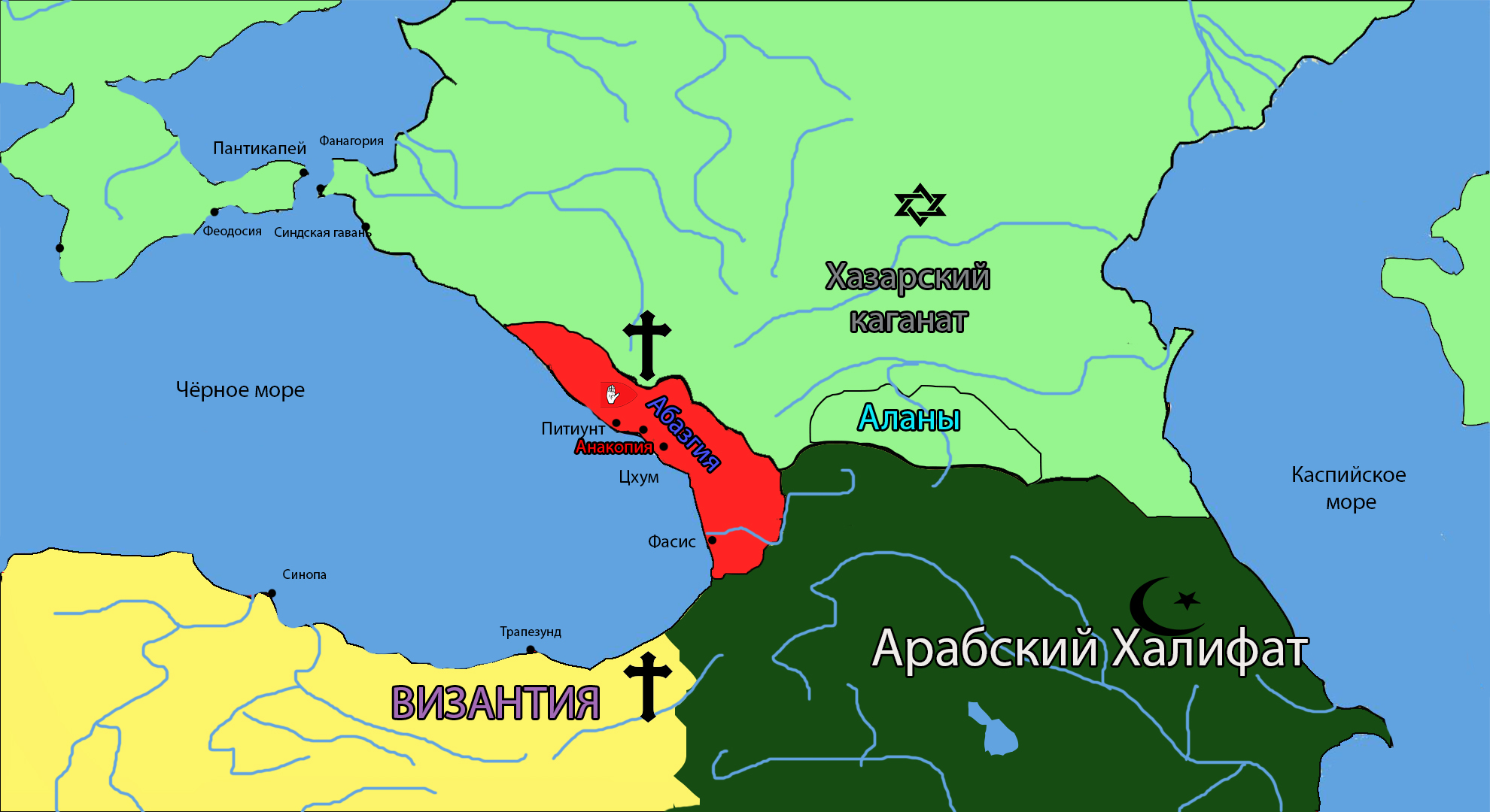 Карта